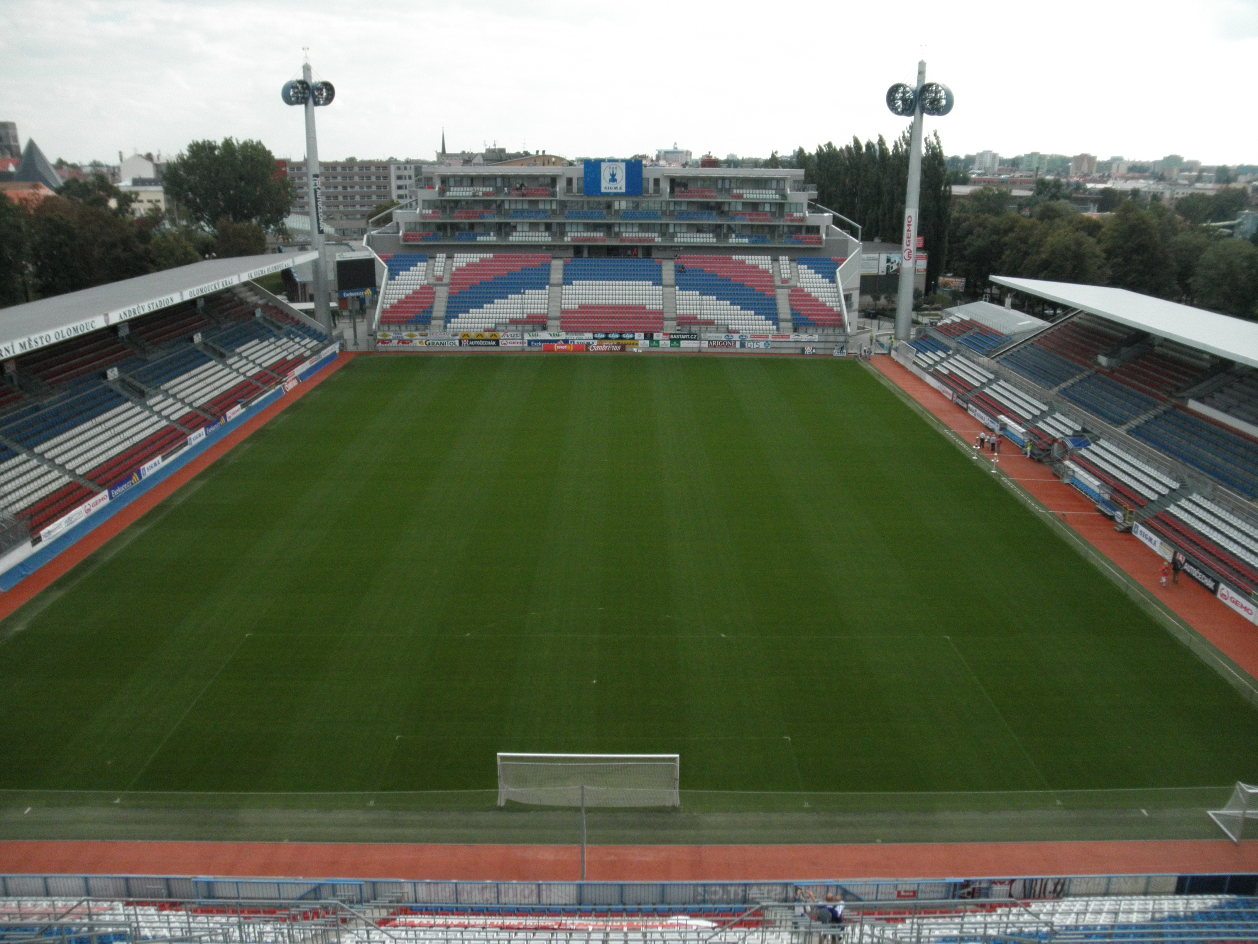 Andrův stadion v Olomouci.